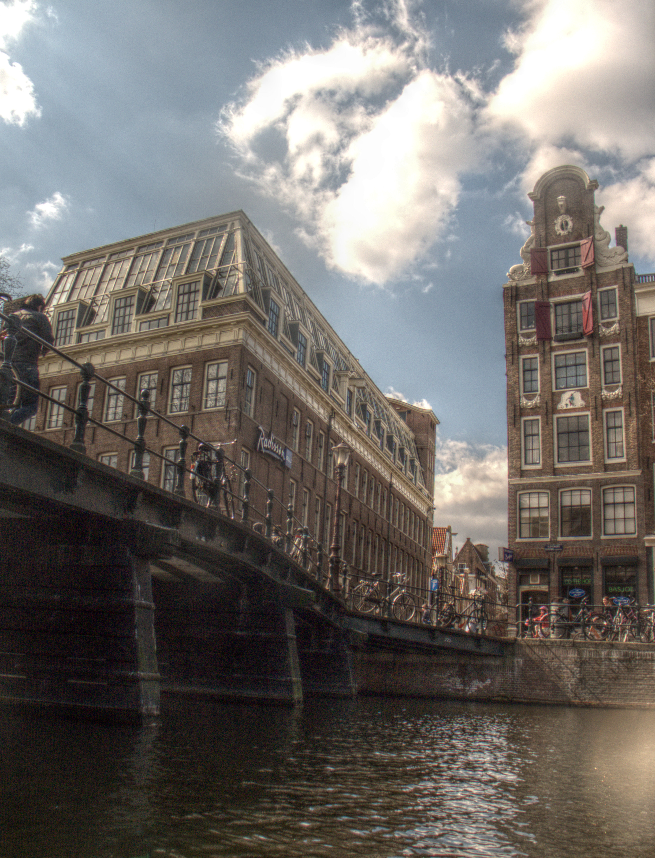 De straat Rusland in Amsterdam, gezien vanaf de Oostindische brug (no 223)